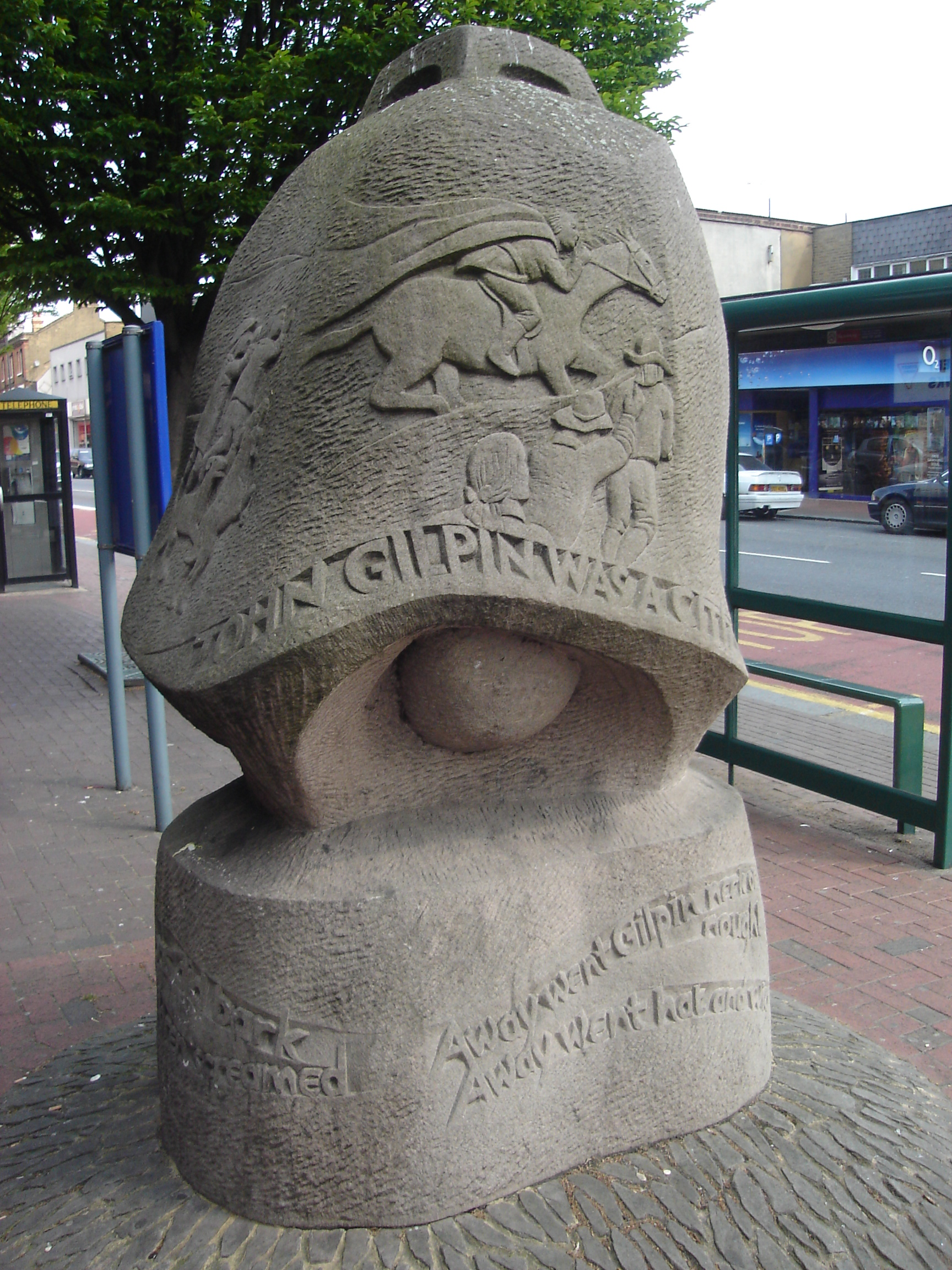 Gilpin's Bell sculpture at Edmonton